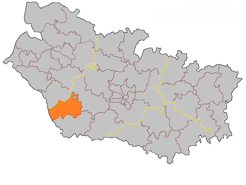 Кантон Орнуа-ле-Бур на карте департамента Сомма